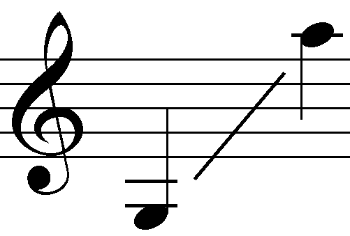 Range of a mezzo-soprano voice